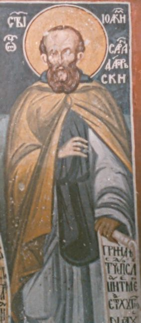 Изображение на Свети Йоаким Сарандапорски на стенописите в Погановския манастир " Св. Йоан Богослов", Царибродско. 1499 година.